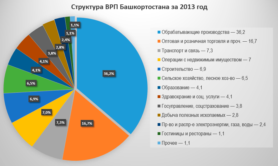 Структура валового регионального продукта (ВРП) Республики Башкортостан за 2013 год. По данным сайта Мировой атлас данных. Республика Башкортостан. Структура ВРП, ссылающегося на Федеральную Службу Государственной Статистики Российской Федерации.